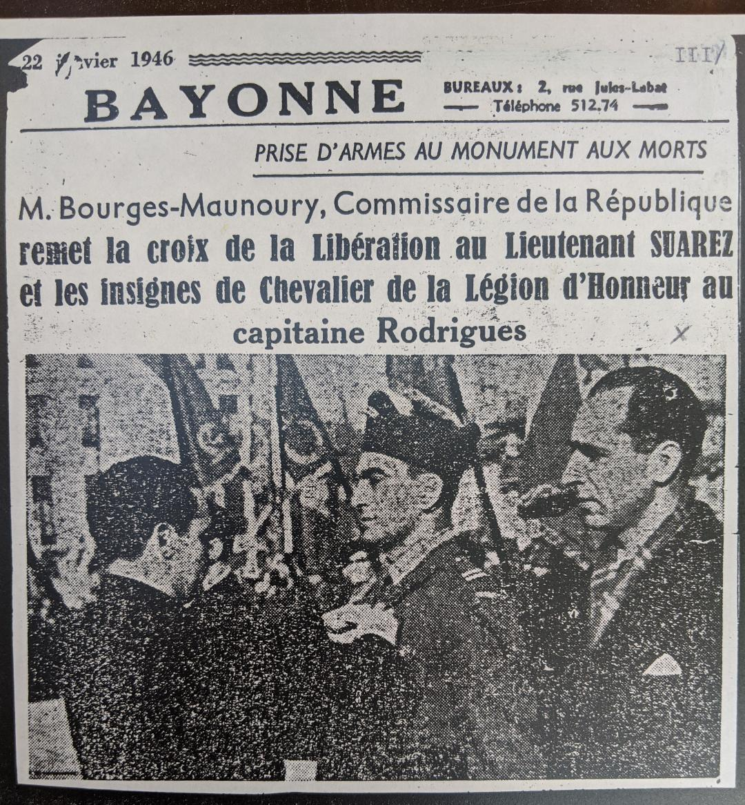 Photo d'un journal bayonnais de 1946, honneurs militaires à 2 de mes aïeux (cousin Marcel Suares et grand-père Robert Rodrigues)